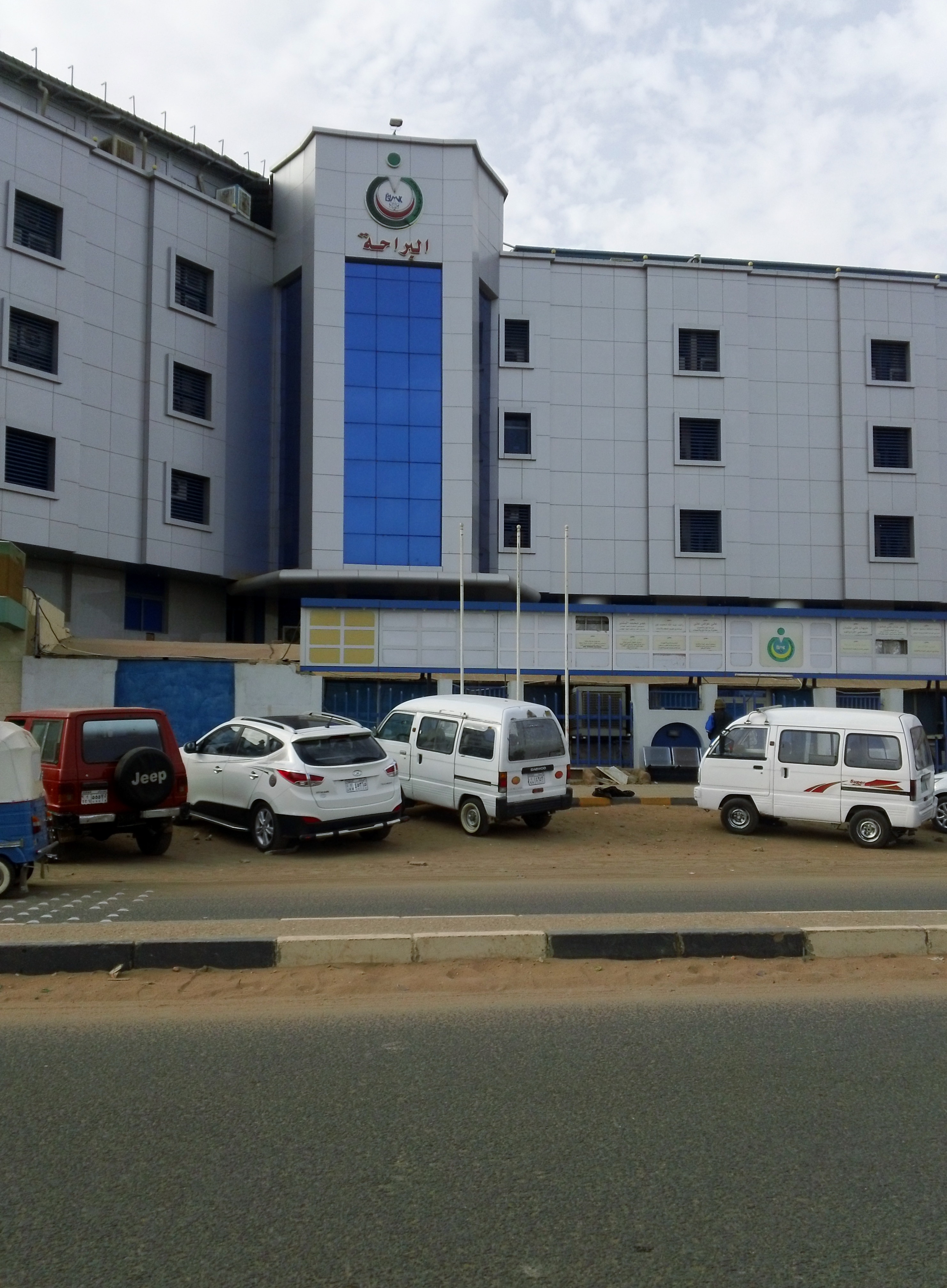 Al Baraha Hospital - Khartoum Bahari - Sudan